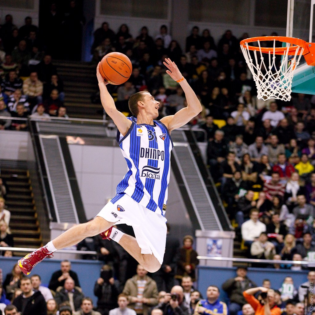 фото Олександра Мішули